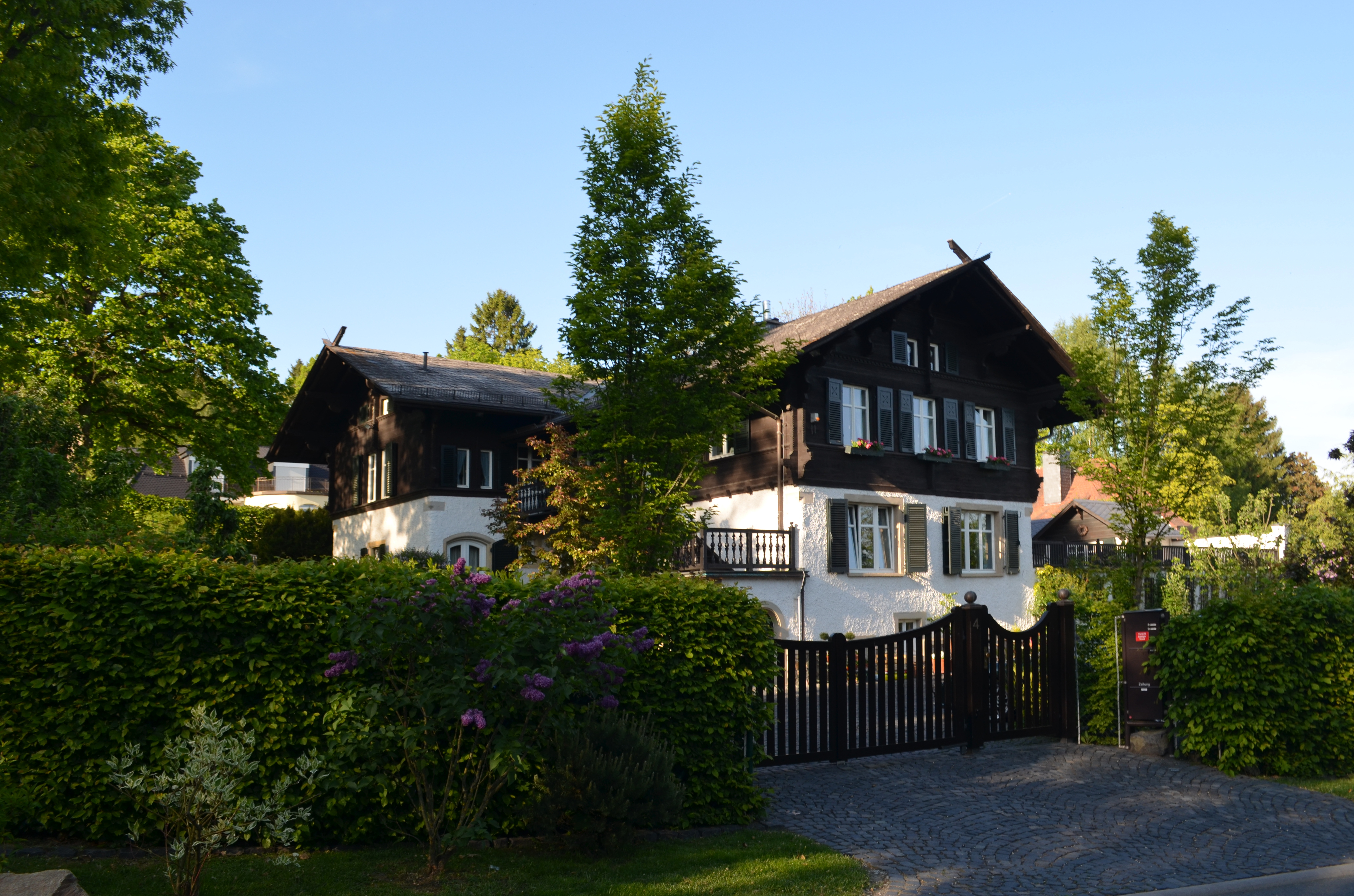 Königstein, Rombergweg 4. Elf Jahre lang von 1927 bis 1938 bewohnte die Familie Hermann Wronker (* 5. August 1867 im Wartheland; † 1942 im KZ Auschwitz zusammen mit seiner Frau Ida) diese 1899 für Kommerzienrat Heinrich Karl Ferdinand Gottlob Flinsch (1839–1921), Inhaber der damaligen Weltfirma Schriftgiesserei Flinsch und 25 Jahre Stadtrat der Stadt Frankfurt am Main errichtete Sommervilla unterhalb des Rombergs am Rombergweg in Königstein im Taunus. Der jüdische Unternehmer Hermann Wronker, ein Neffe der Gebrüder Leonhard und Oscar Tietz, war ein legendärer deutscher jüdischer Warenhaus-Unternehmer und Begründer der Warenhauskette Wronker. Kaufhaus Wronker war die populäre Bezeichnung für die Warenhäuser der Hermann Wronker AG. „Flaggschiff“ des Unternehmens war das berühmte, 1944 durch Luftangriffe zerstörte Warenhaus auf der Zeil in Frankfurt am Main.